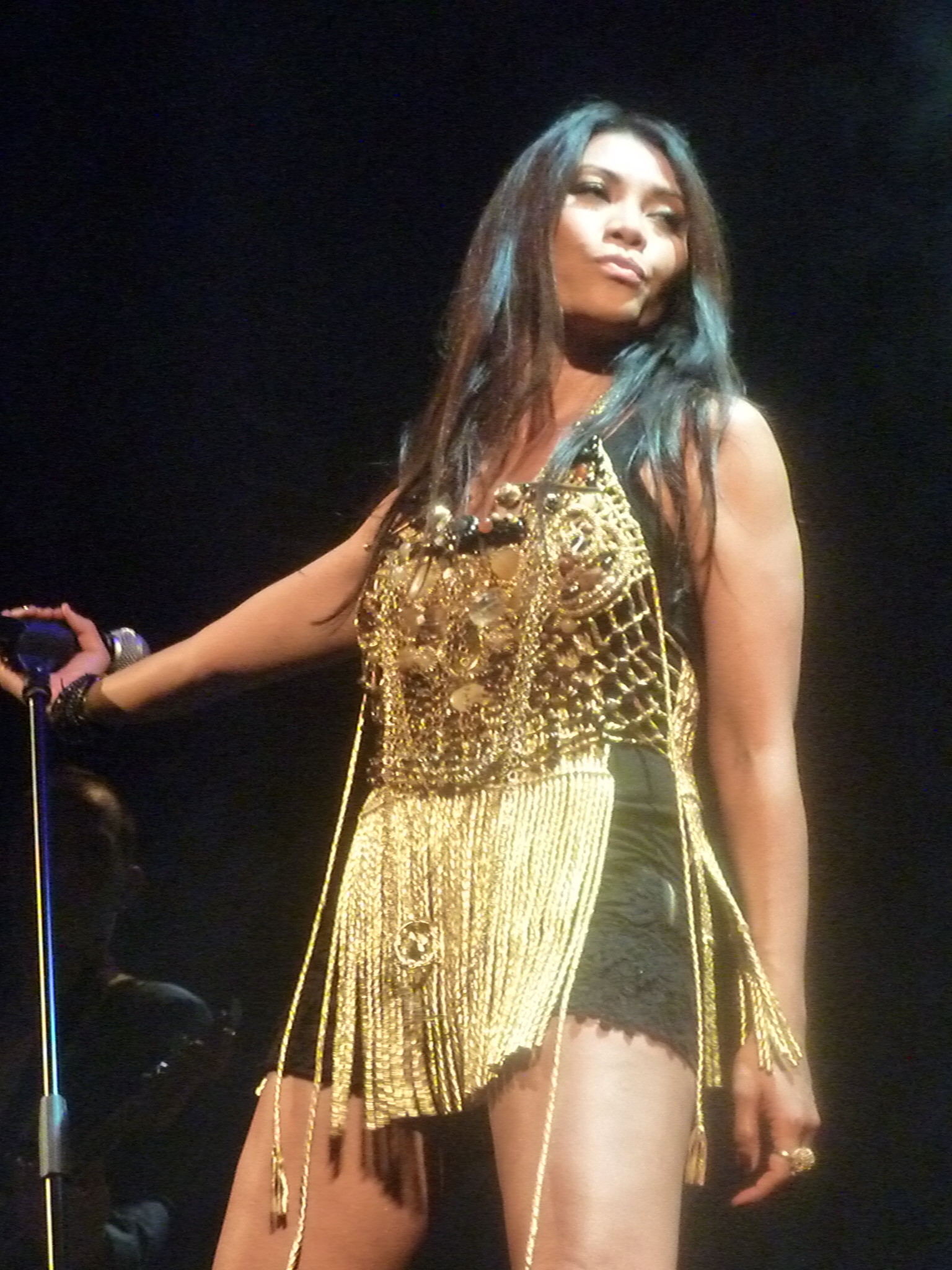 La chanteuse Anggun en concert au Trianon à paris en juin 2012